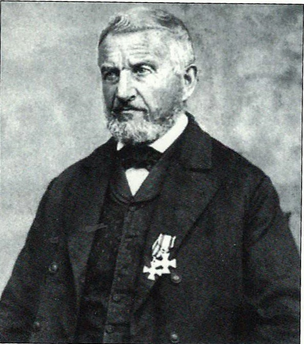 Der Bezirksfeldwebel Wilhelm Appelkamp